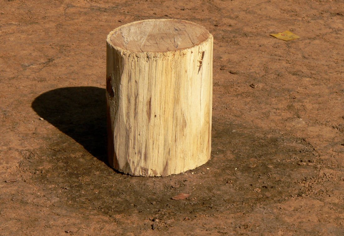 Bandkeramische Siedlung auf dem Mühlengrund in Rosdorf, dunkle Bodenverfärbungen eines massiven Pfostenlochs der Siedlung, zur Verdeutlichung mit heutigem Holzstamm